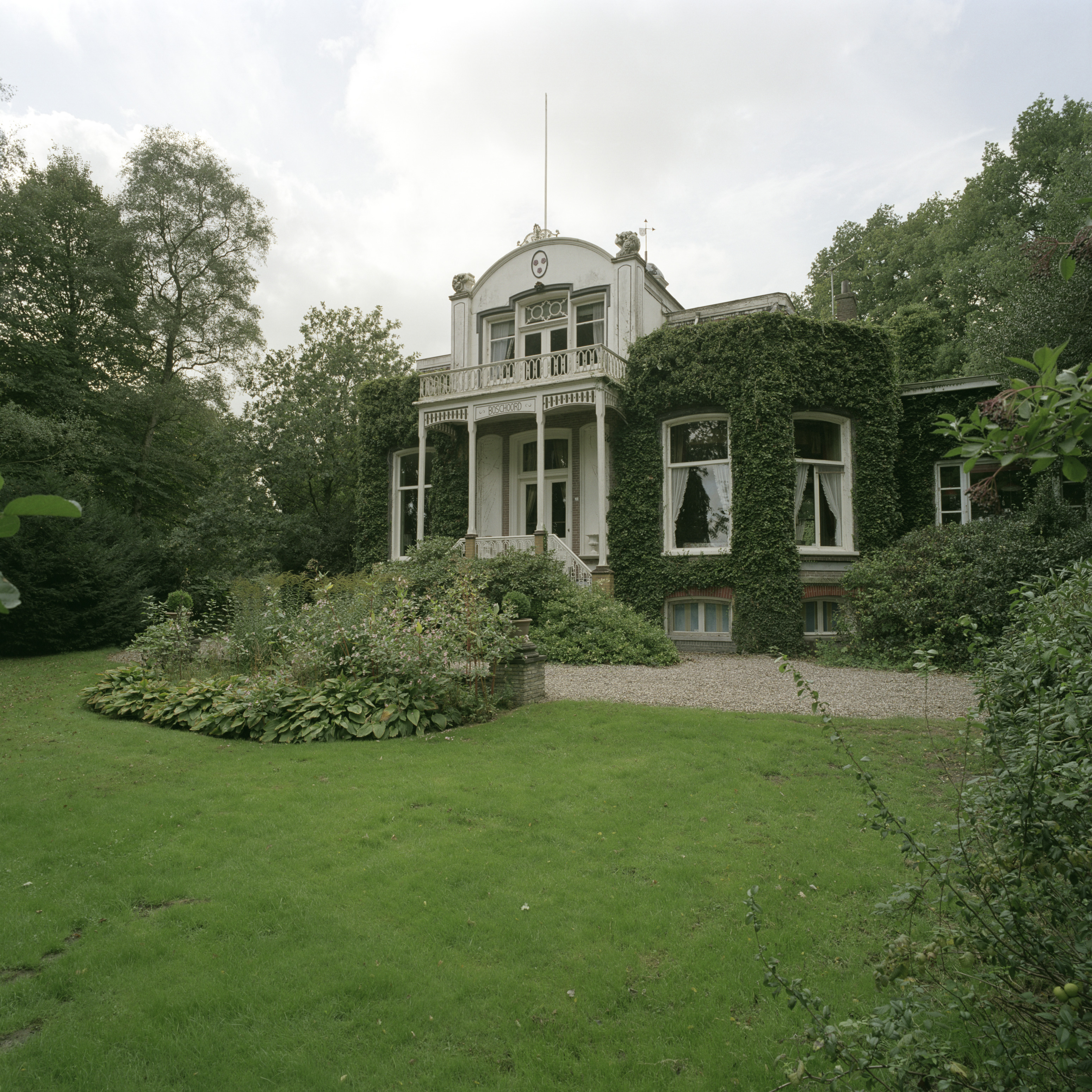 Boschoord: Overzicht van de voorgevel